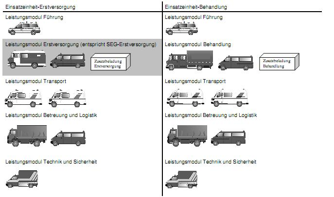 Graphische Darstellung der Gliederung einer Einsatzeinheit Gemeinsame nach den Hinweise MANV und MANV-Konzept des Innenministerium Baden-Württmberg